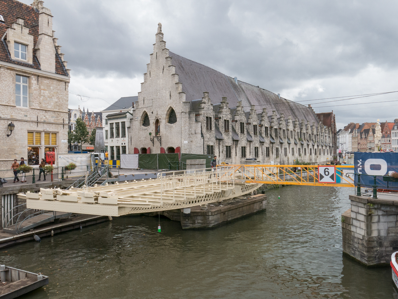 Vleeshuisbrug